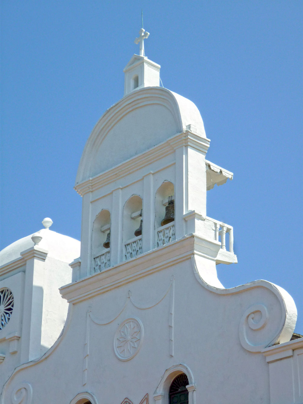 Detalle de la parroquia Santiago Apóstol de Tolú.